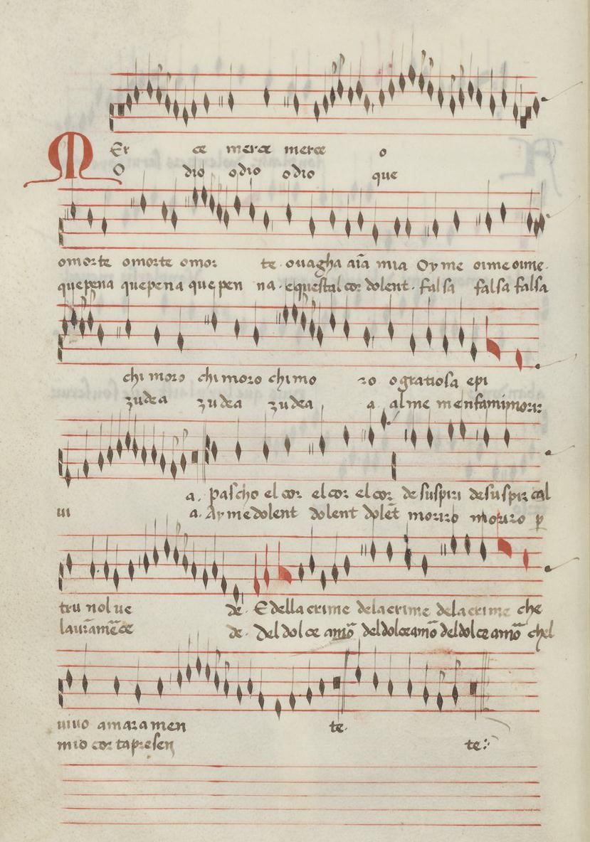 Paris, Bibliothèque Nationale, fonds nouv. acq. français 4917